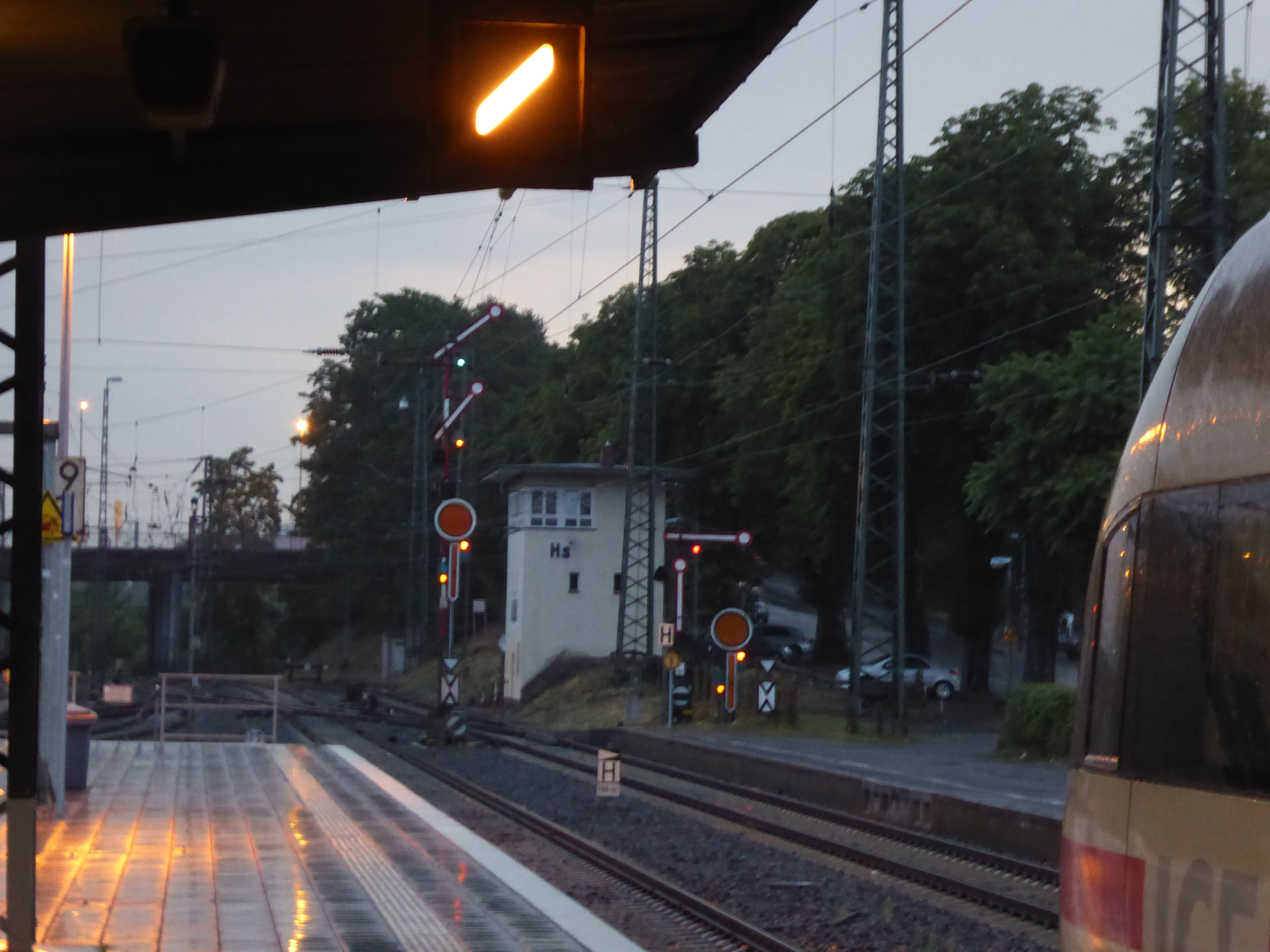 Formsignale auf der Westseite des Hauptbahnhof Hanau. In der Abenddämmerung sind Nacht- und Tagzeichen zu erkennen.